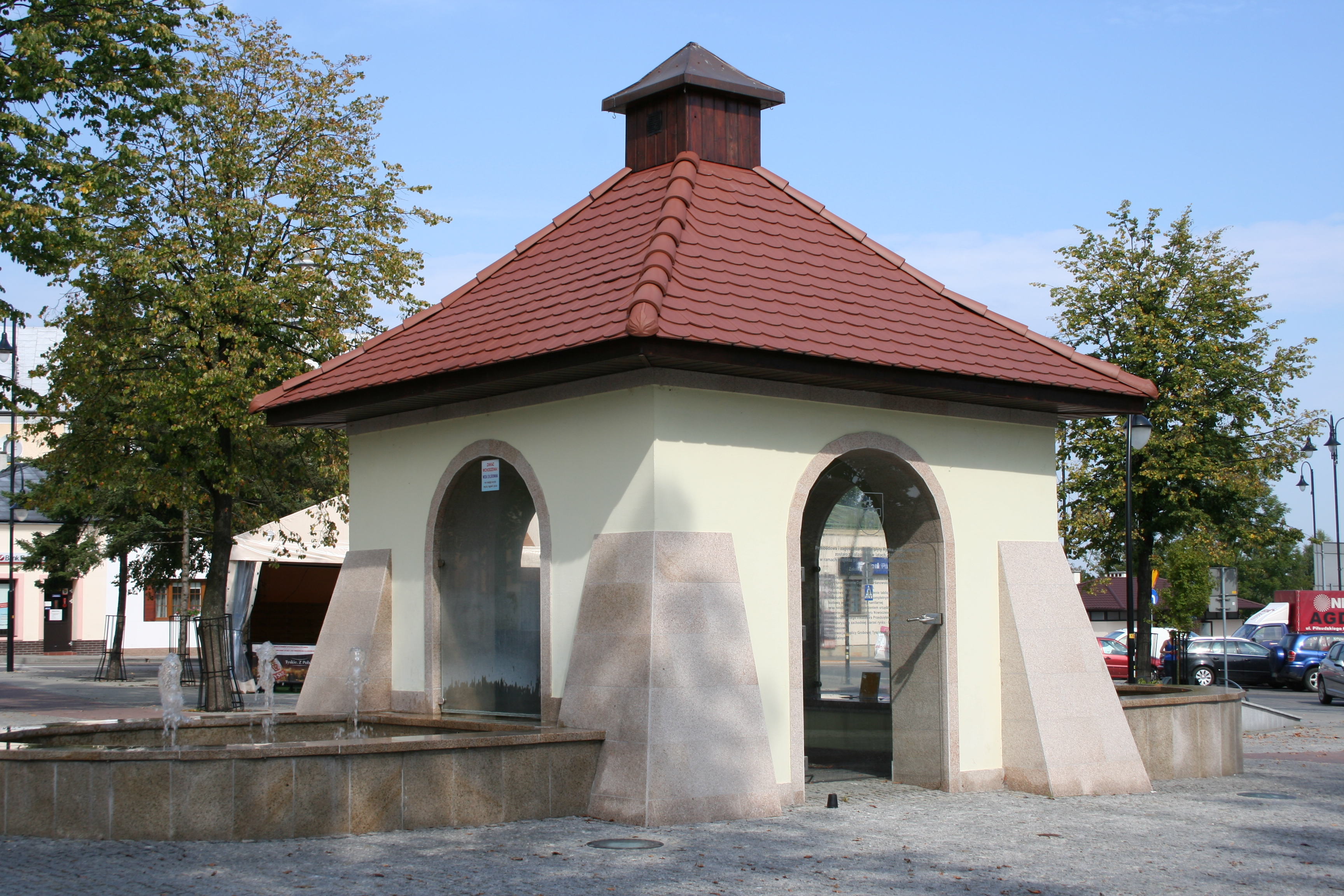 Kolbuszowa, studnia miejska (z pl. Rynku), ok. 1860-1880, 1942